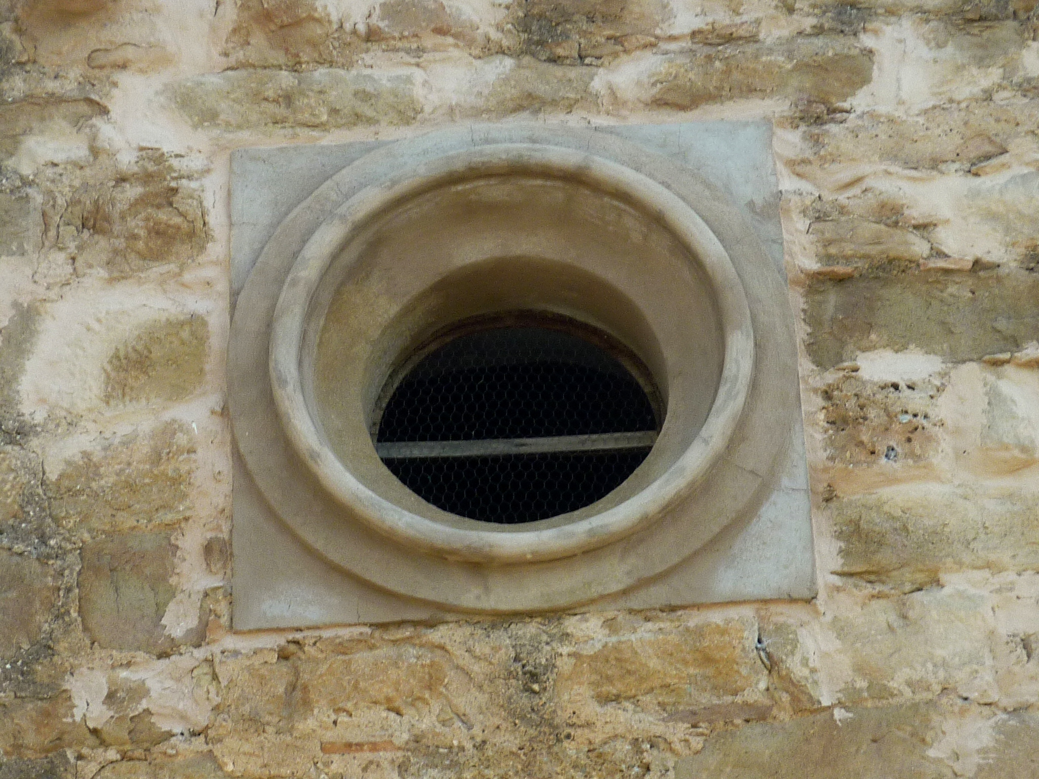 Església Santa Margarida de Pampa (Castellar de la Ribera): òcul monolític